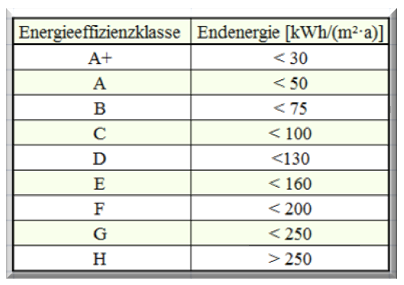 Tabelle Effizienzklasse EnEV 2014